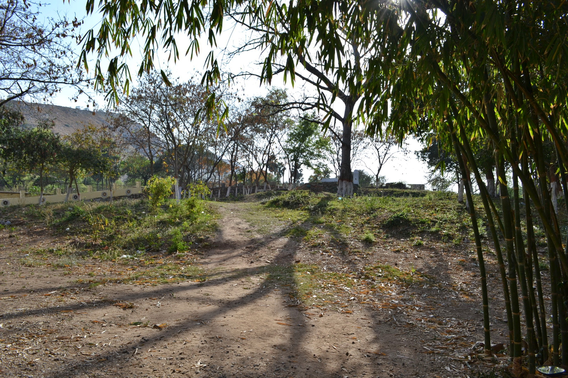 เนินดินที่เชื่อว่าเป็นที่ตั้งของพระมูลคันธกุฎี แห่งวัดเวฬุวันมหาวิหาร อารามแห่งแรกในพระพุทธศาสนา ถ่ายที่: ราชคฤห์ ประเทศอินเดีย Mulagandhakuti in Venuvana Monastery, Rajgir, India. This is the place (or hut) where the Buddha used to stay when he lived in Venuvana. Venuvana (Pali language) translates as 'Bamboo forest' or 'Bamboo Grove'. Venuvana was the first monastery of the Buddhist Monastic Order, donated by King Bimbisara in the first year after Buddha's enlightenment.